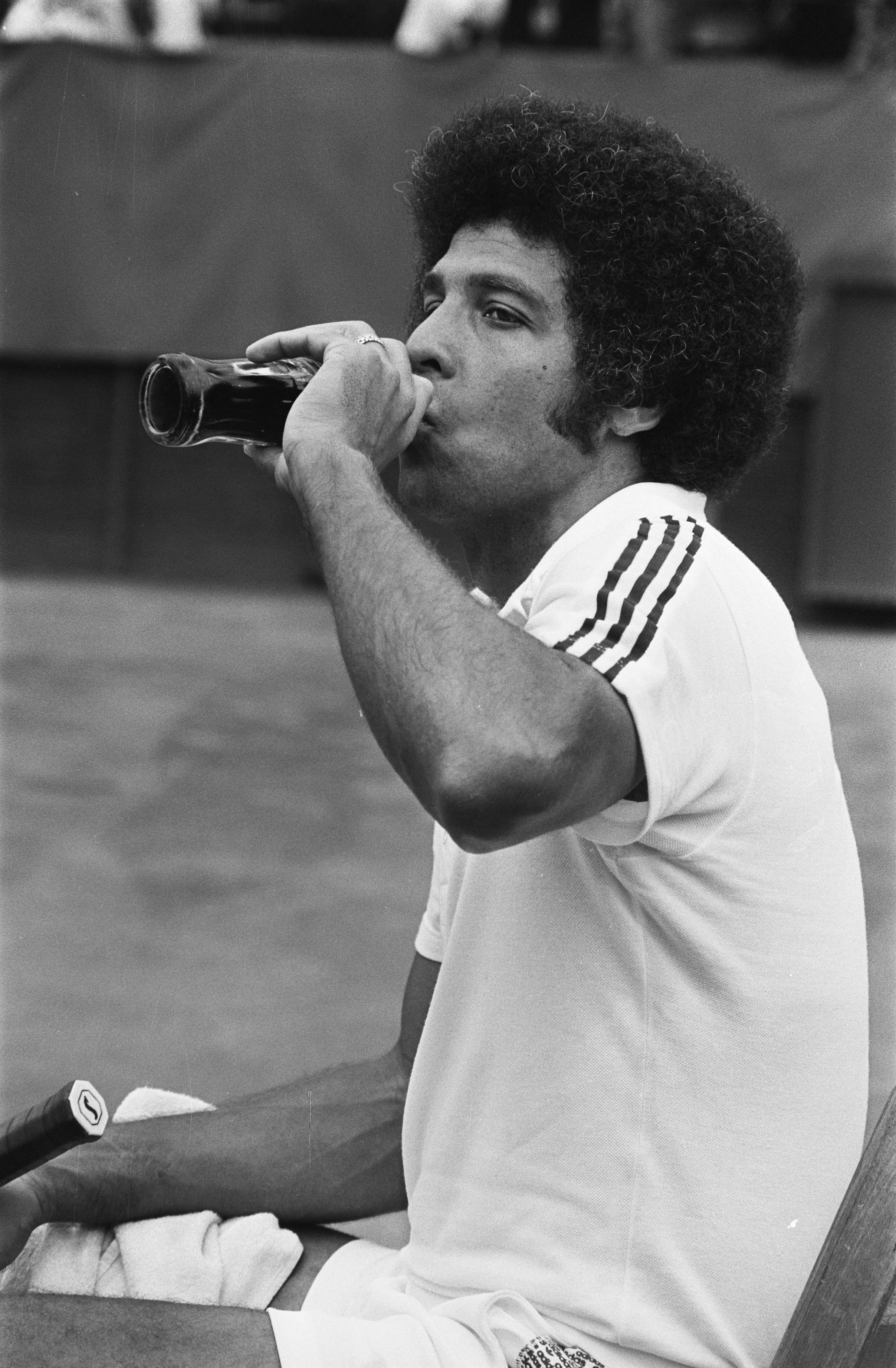 Collectie / Archief : Fotocollectie Anefo Reportage / Serie : Internationale tenniskampioenschappen 1975 op het Melkhuisje in Hilversum Beschrijving : De Antilliaan Hose met frisdrank tijdens een break Datum : 15 juli 1975 Locatie : Hilversum, Noord-Holland Trefwoorden : tennis, toernooien Persoonsnaam : Hose, Humphrey Instellingsnaam : Melkhuisje, 't Fotograaf : Fotograaf Onbekend / Anefo Auteursrechthebbende : Nationaal Archief Materiaalsoort : Negatief (zwart/wit) Nummer archiefinventaris : bekijk toegang 2.24.01.05 Bestanddeelnummer : 928-0491